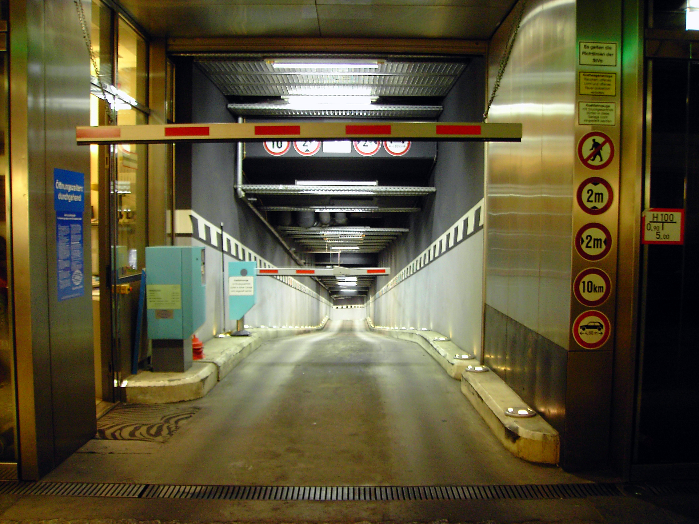 Tiefgarage in Berlin Mitte bei Nacht - hier: ein besonderer Schwung